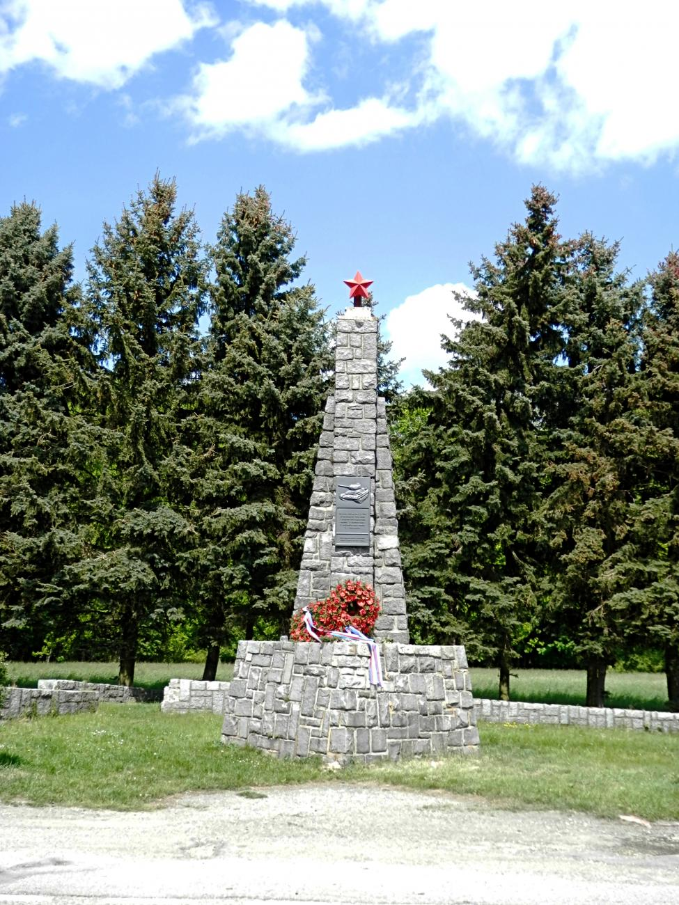 Pomník připomínající setkání I. Ukrajinského frontu vedeného maršálem Koněvem s vojsky II. Ukrajinského frontu s velitelem maršálem Malinovským